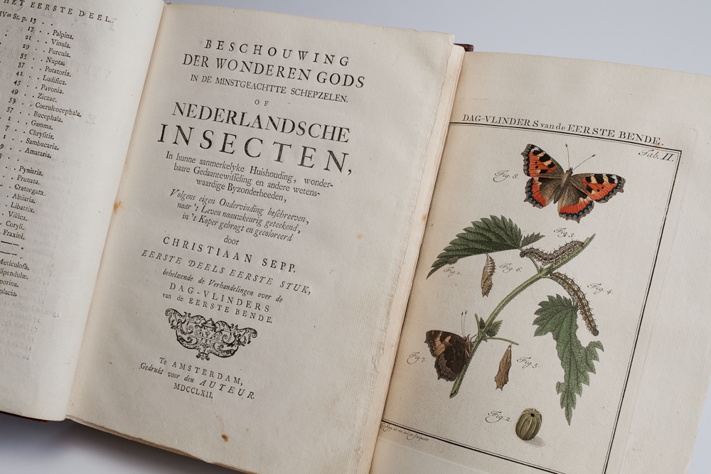 Christiaan Sepp, Beschouwing der wonderen Gods, in de minstgeachtte schepzelen. Of Nederlandsche insecten. Te Amsterdam, Gedrukt voor den auteur, 1762, titelpagina van aflevering 1 en plaat Tab. II. KB: 555 E 5:1. (Koninklijke Bibliotheek, Jos Uljee) Zie ook / Image uploaded on 02-10-2013 from the Flickr stream of the Royal Library, The Hague (Koninklijke Bibliotheek, KB, national library of the Netherlands)